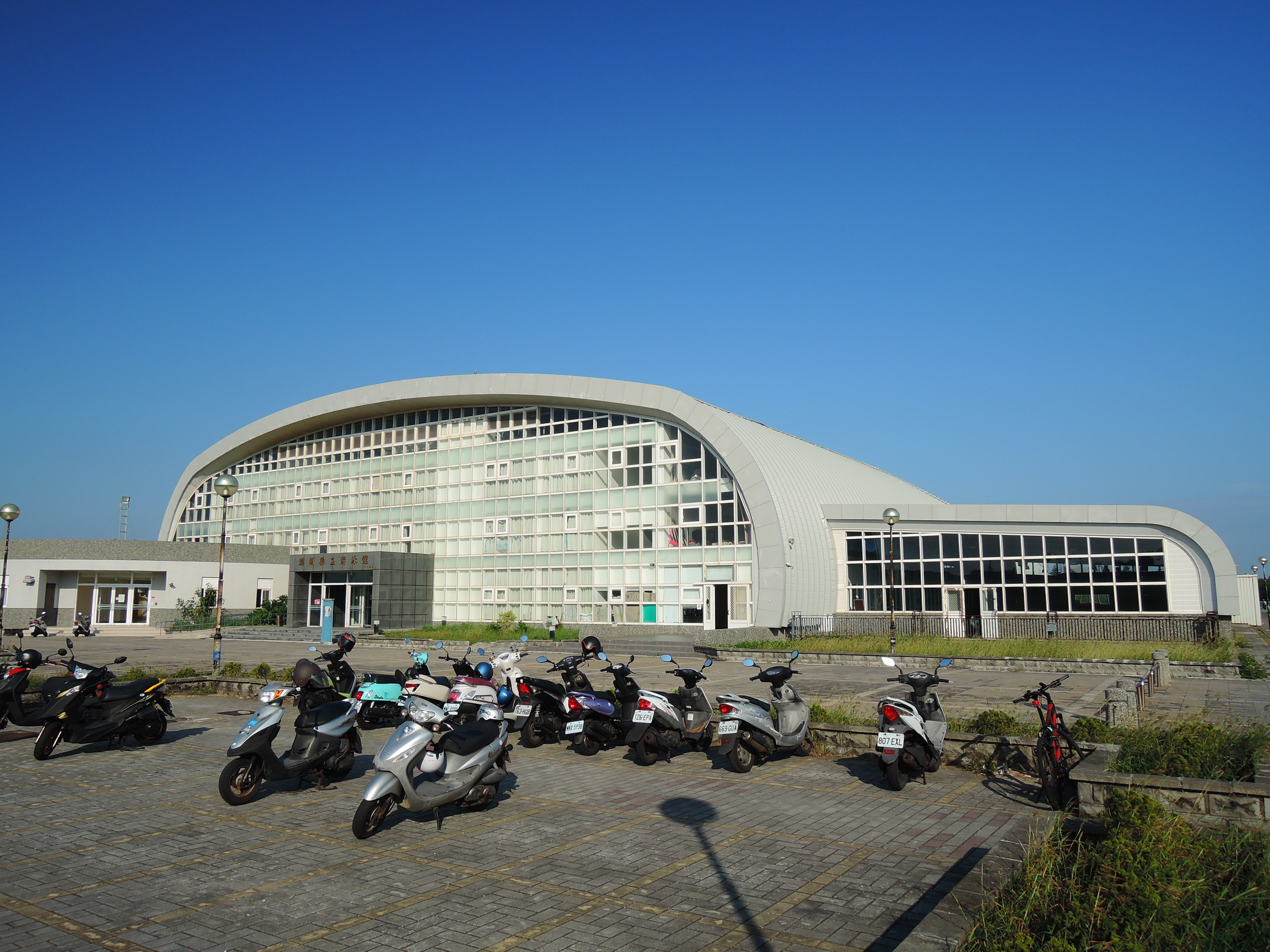 台灣澎湖縣立游泳池，位於湖西鄉大城北村。